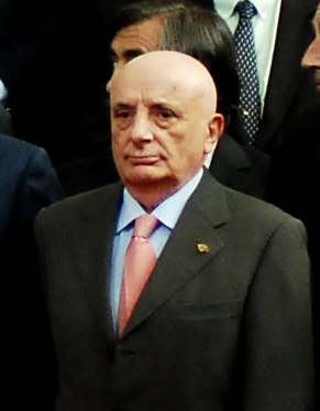 Tesoros vivos de la televisión